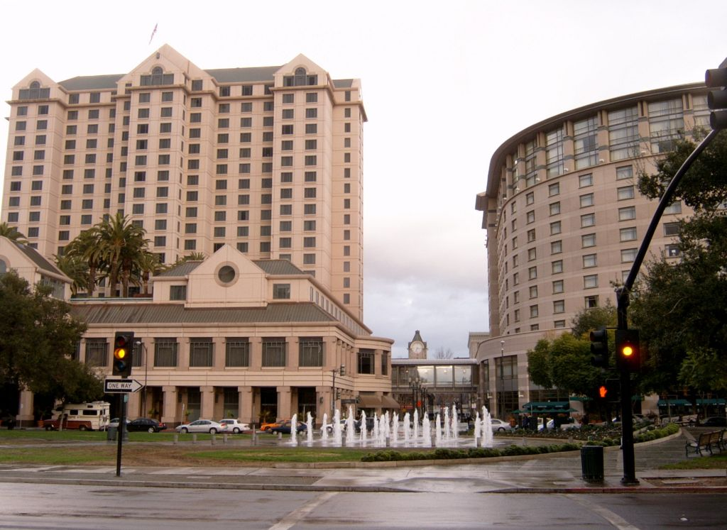 Plaza de Cesar Chavez in San Jose, Kalifornien